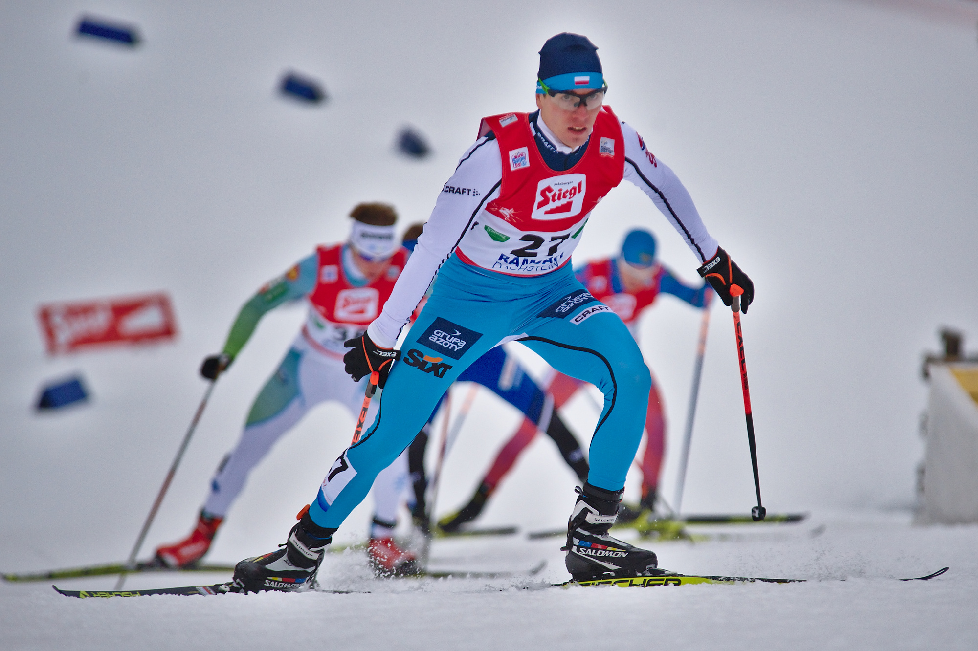 FIS Worldcup Nordic Combined Ramsau 2016. Bild zeigt Szczepan Kupczak (POL)